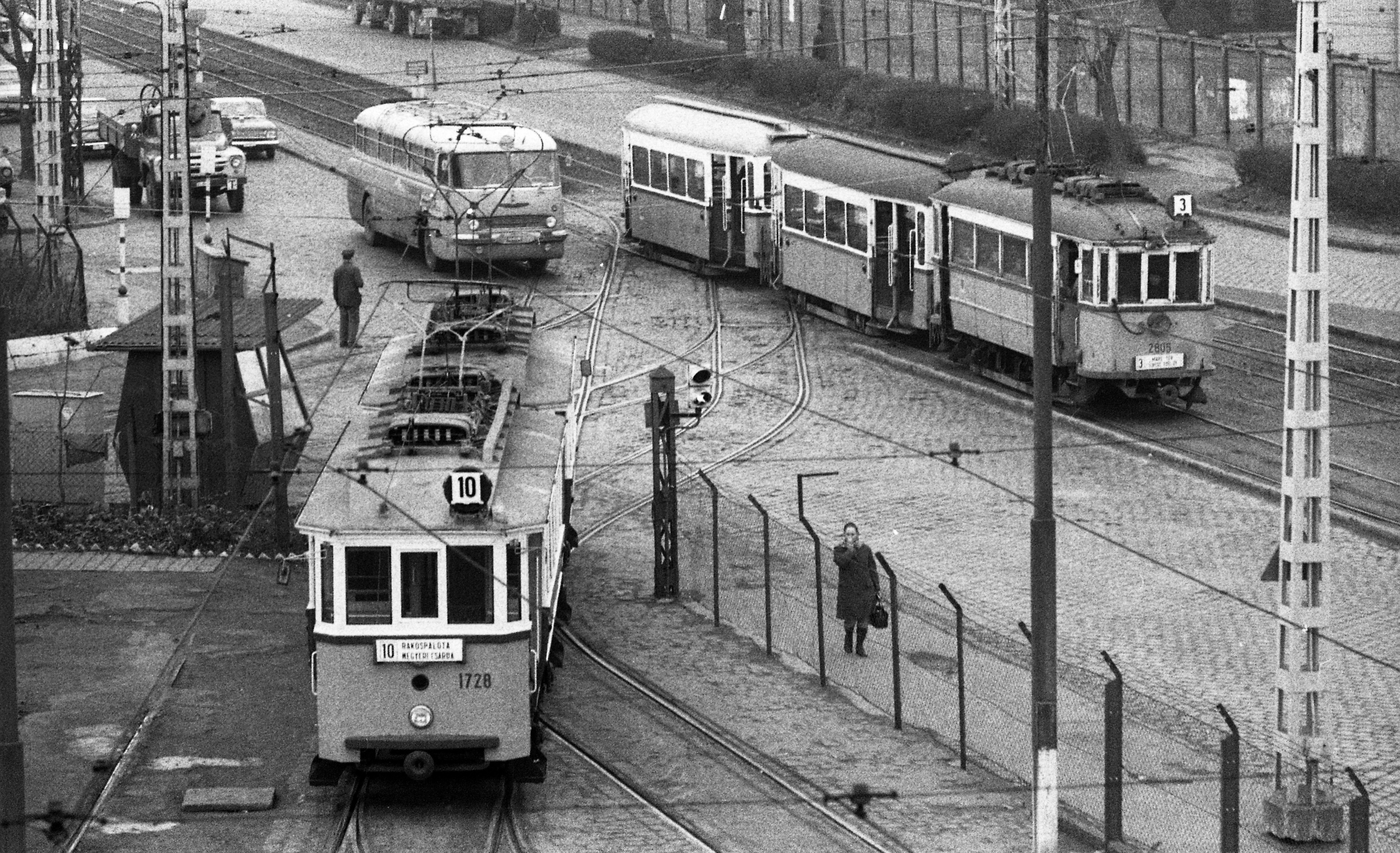 Váci út, Újpest kocsiszín. Location: Hungary, Budapest XIII. Tags: tram, bus, commercial vehicle, ZIL-brand, learner driver, Ikarus-brand, Hungarian brand, booth, Budapest Title: Váci út, Újpest kocsiszín.